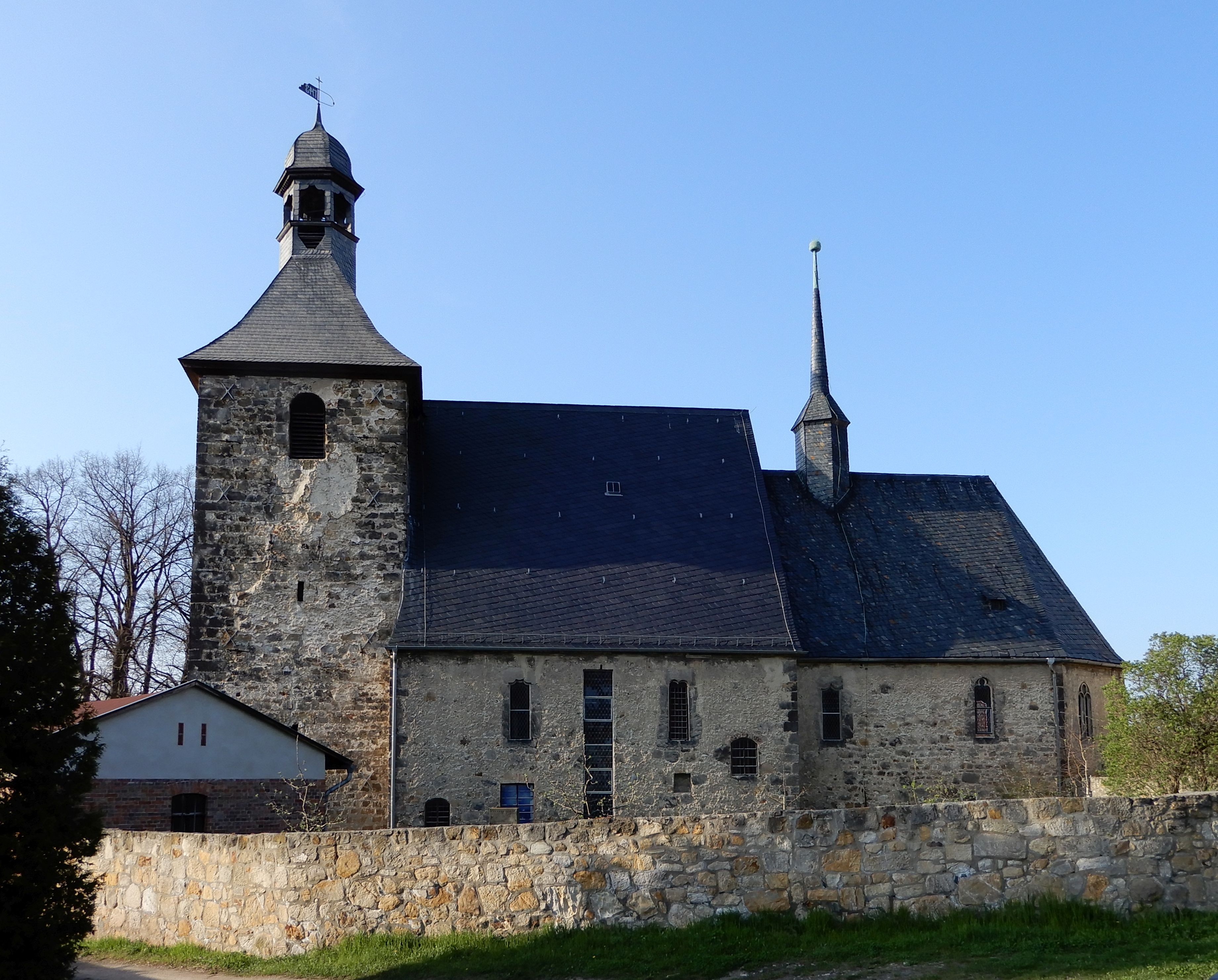 Beatae Mariae Virginis Kirche in Rieder